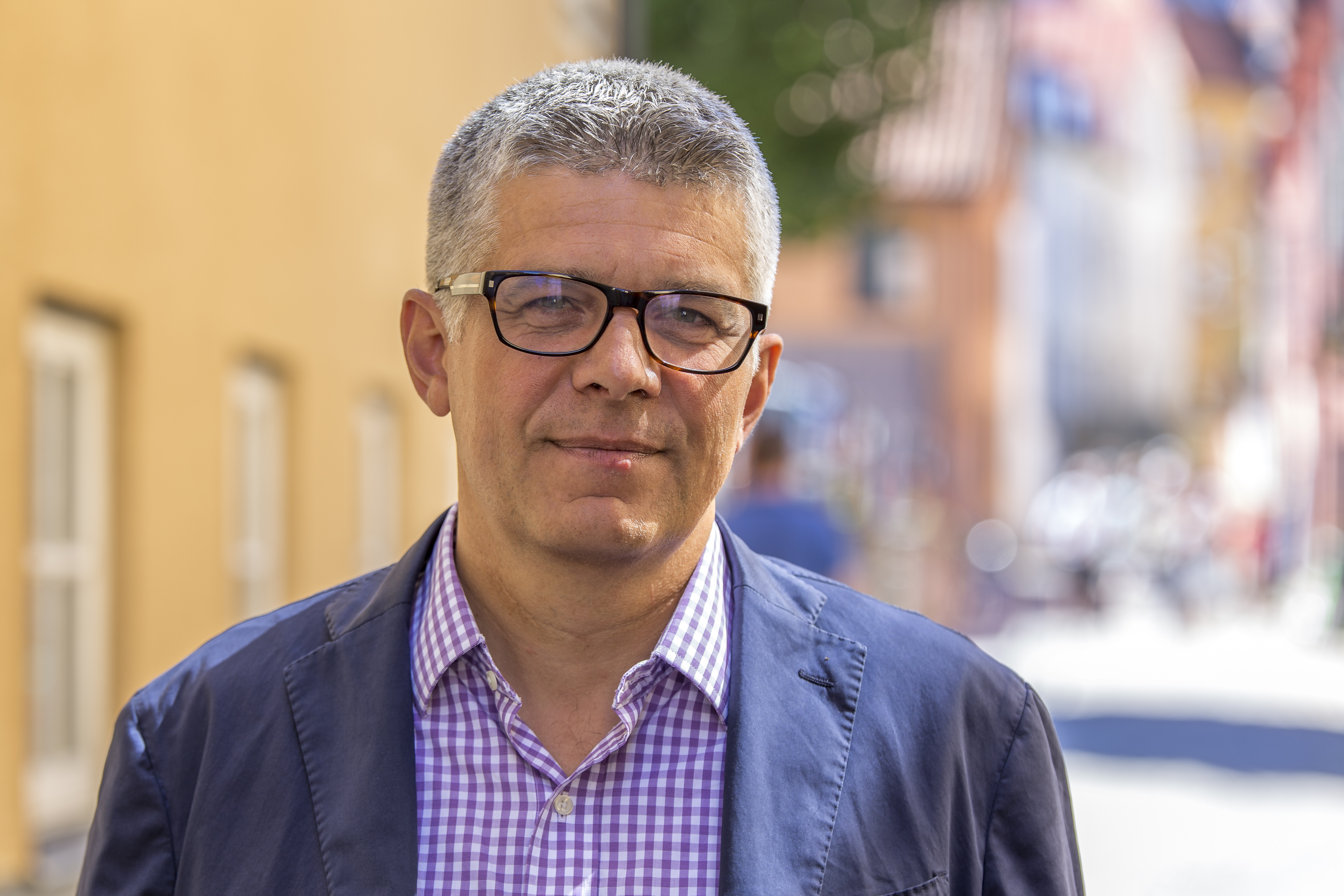 Anders Thornberg är generaldirektör och chef för Säkerhetspolisen (SÄPO) sedan den 5 juli 2012. Detta är efter en intervju med KRIS tidningen "Vägen UT" under Almedalsveckan 2015.